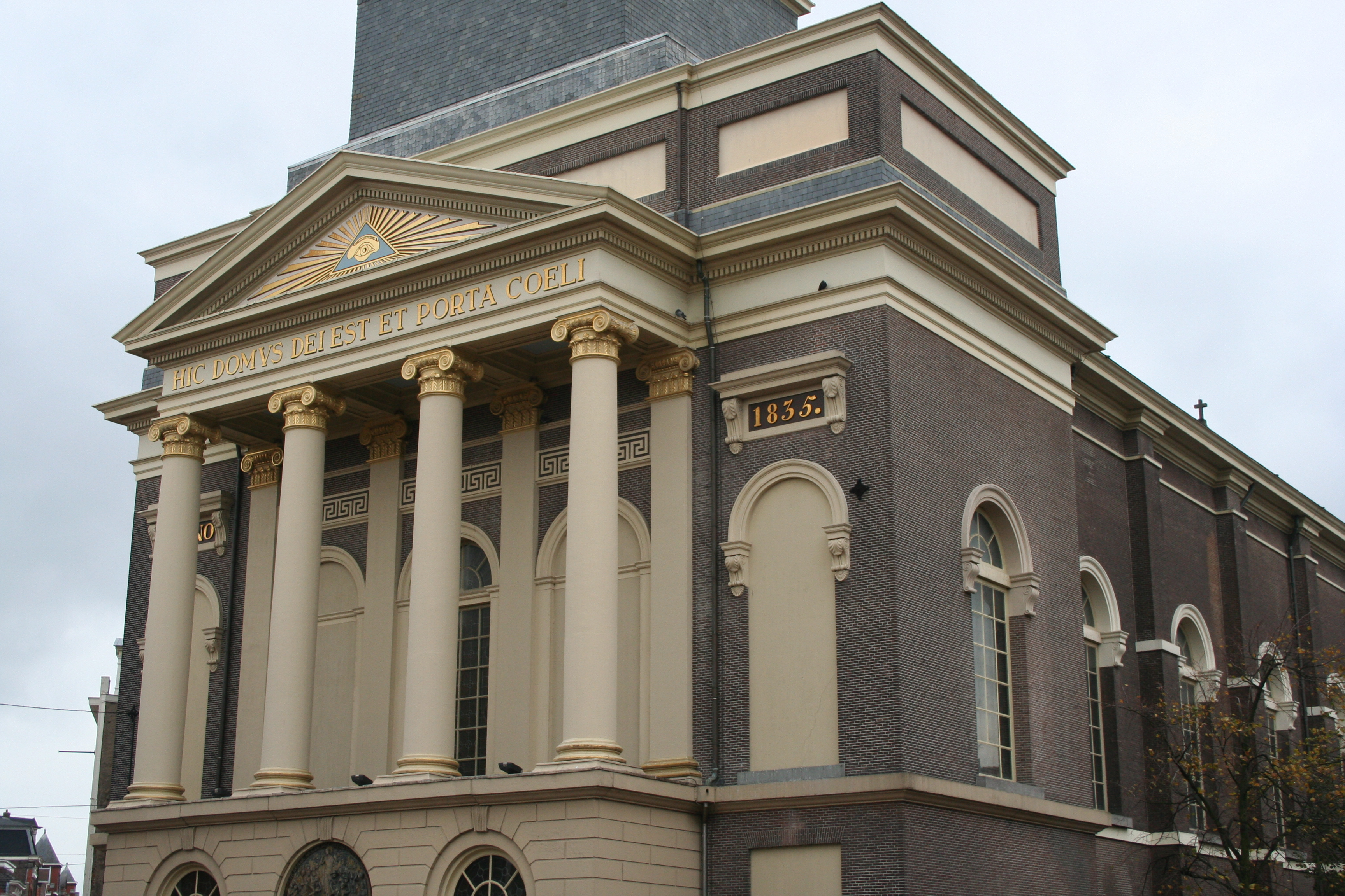 Deze foto heb ik (Robert Smit) genomen met mijn canon eos 350D.